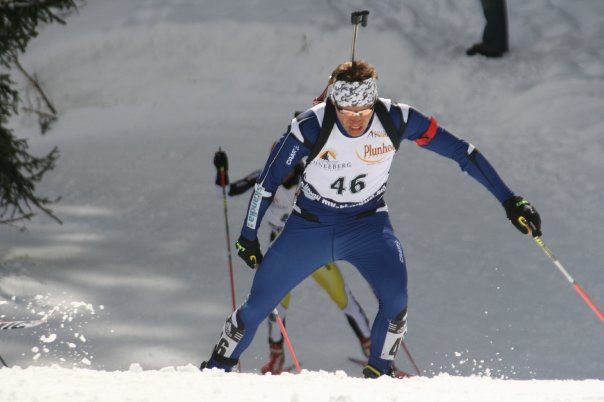 See Title